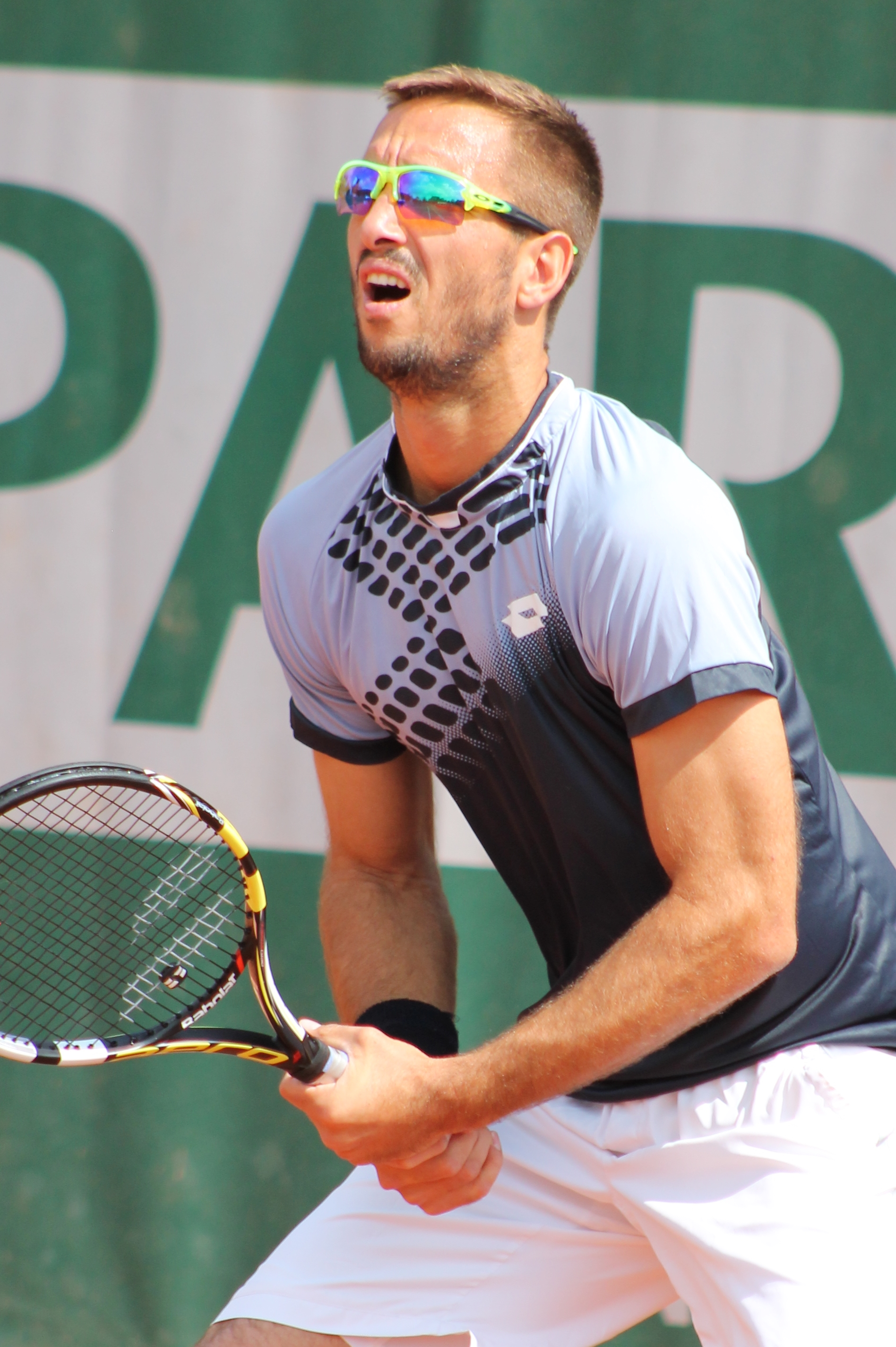 Troicki RG15 (6)